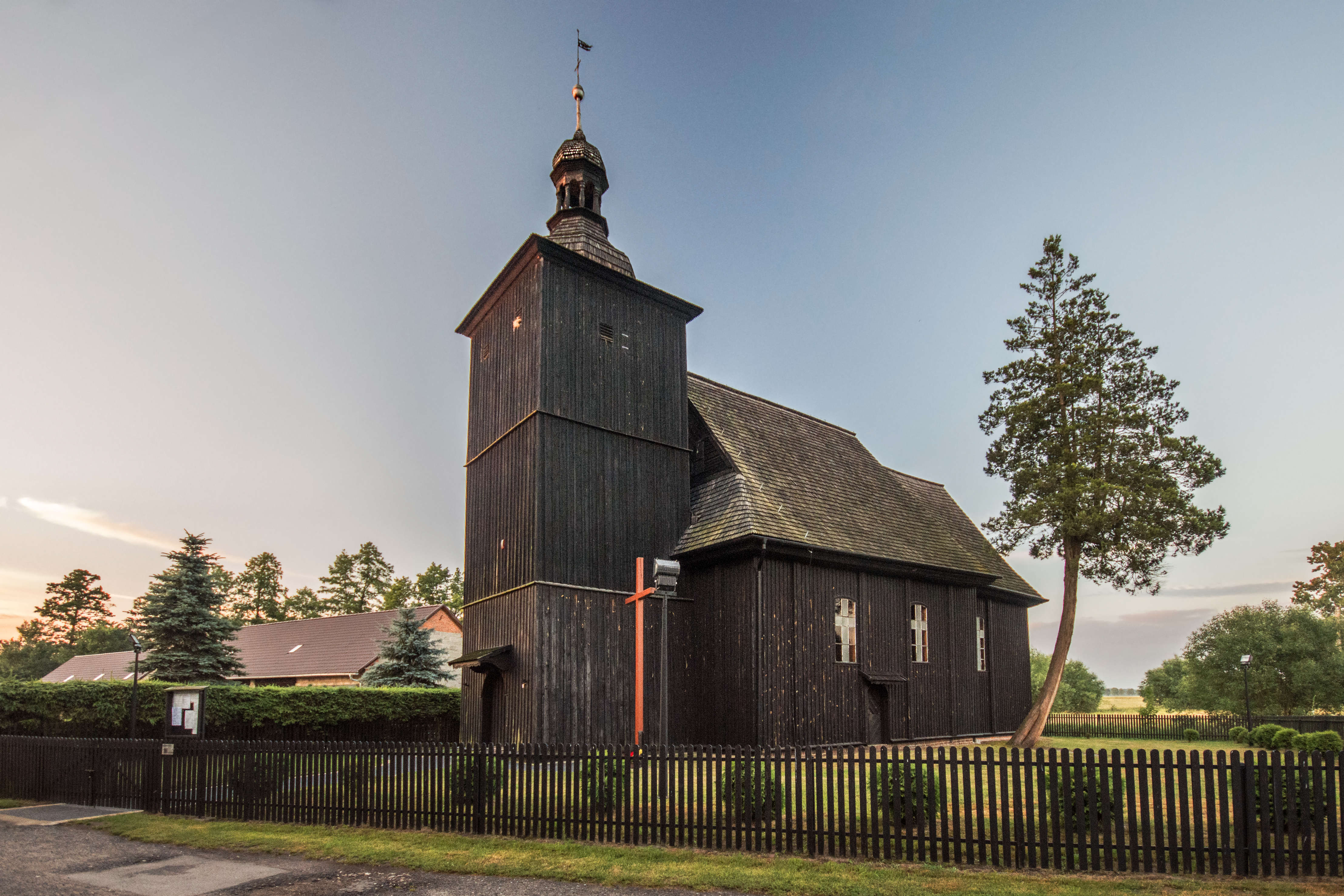 Gołkowice, kościół ewangelicki, ob. rzym.-kat. fil. p.w. św. Jana Chrzciciela, 1766-1767